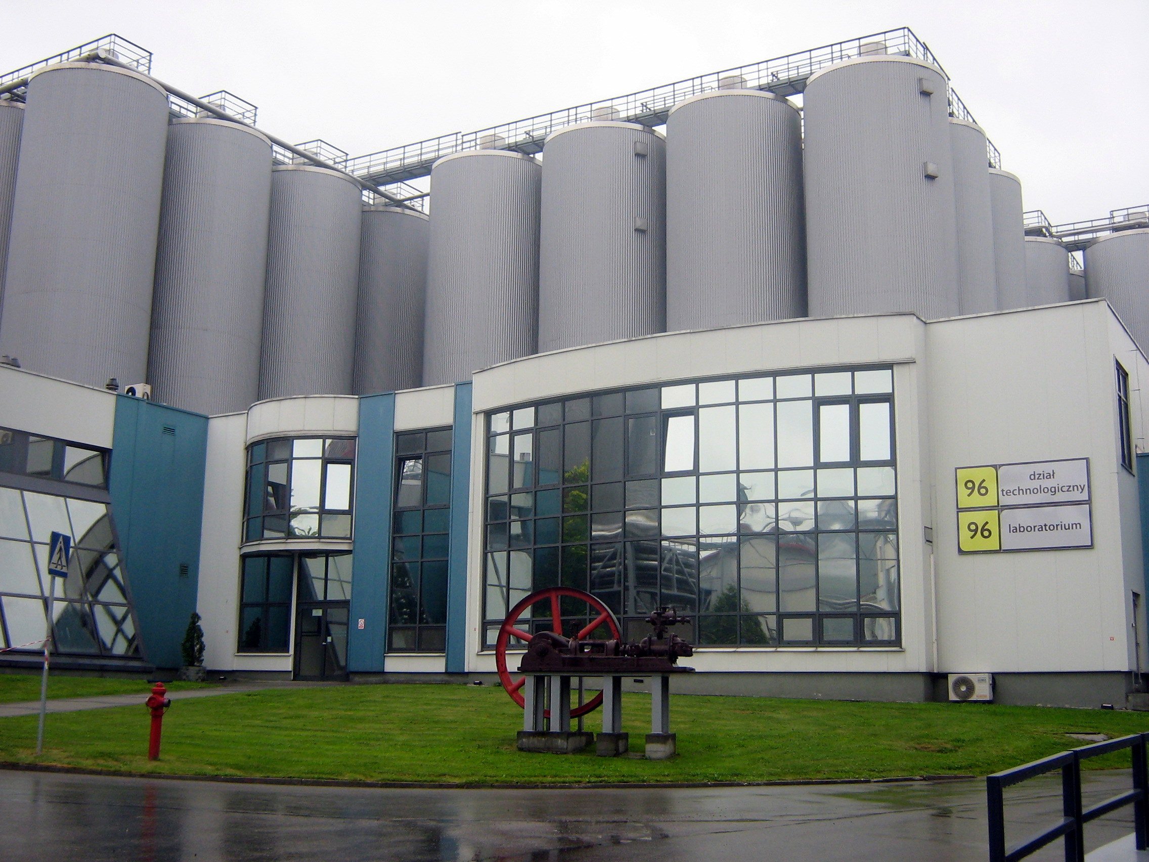 W tle fermentory, łącznie 98